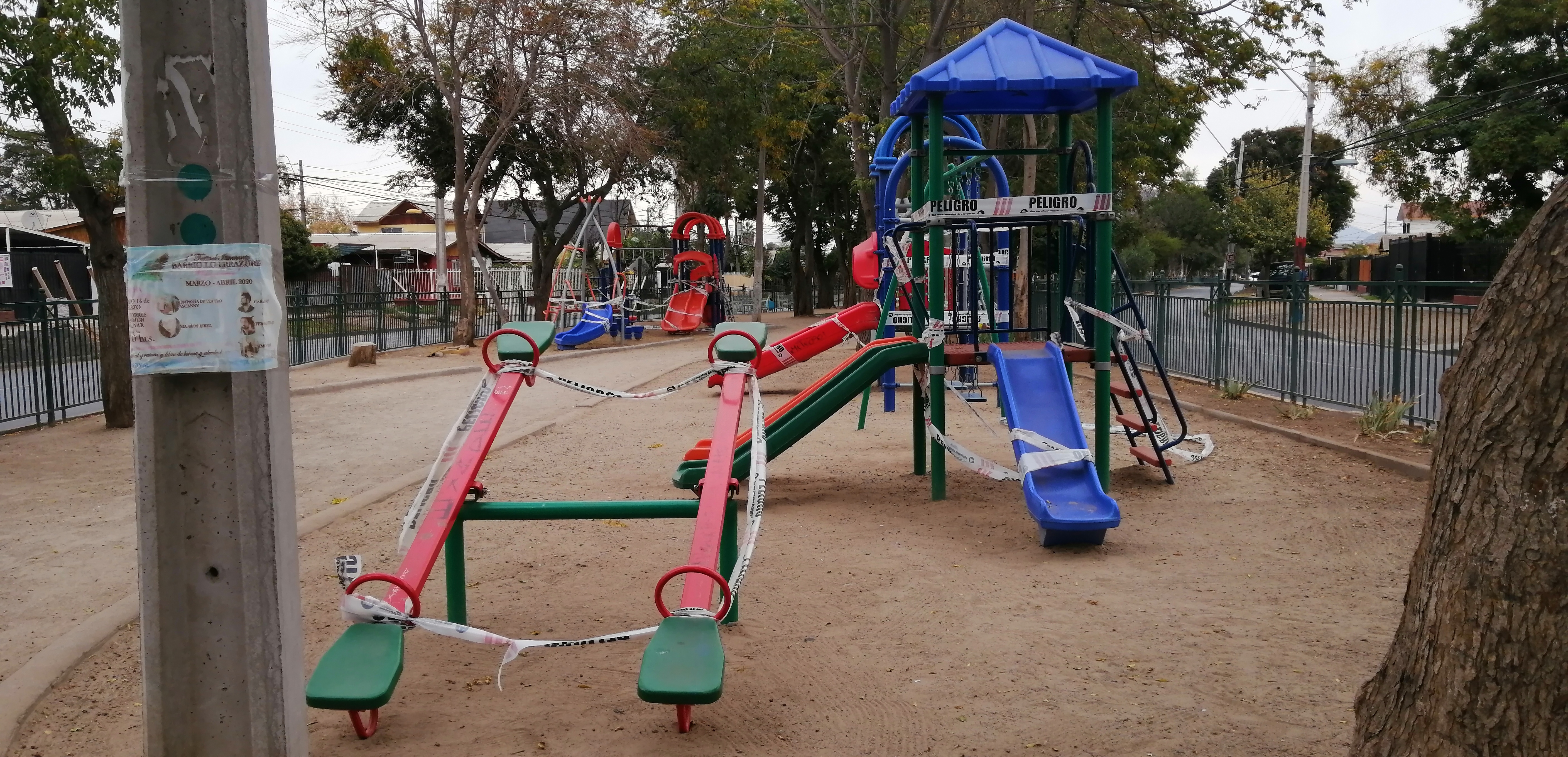 Con el estado de emergencia sanitaria en Chile a causa del virus COVID-19, ya para inicios de abril empresas habían tomado medidas sanitarias limitando el uso de espacios públicos. En la imagen se ven juegos infantiles clausurados por la municipalidad de Miapú para evitar el contagio por contacto.